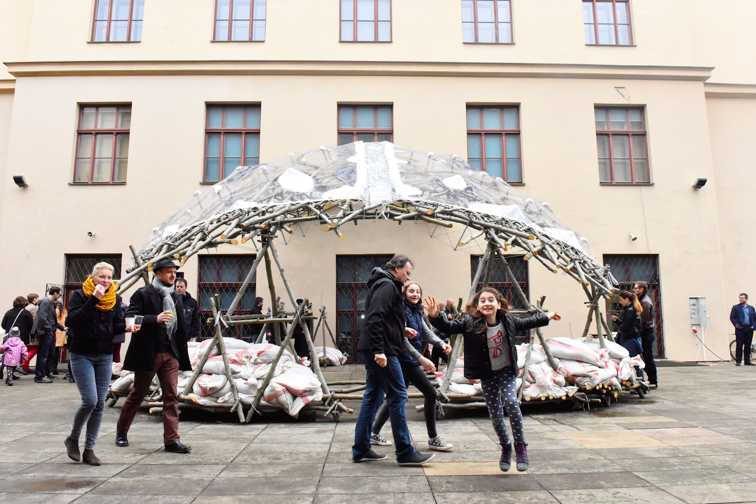 Terasa za Uměleckoprůmyslovým muzeem a instalace Sloní břich